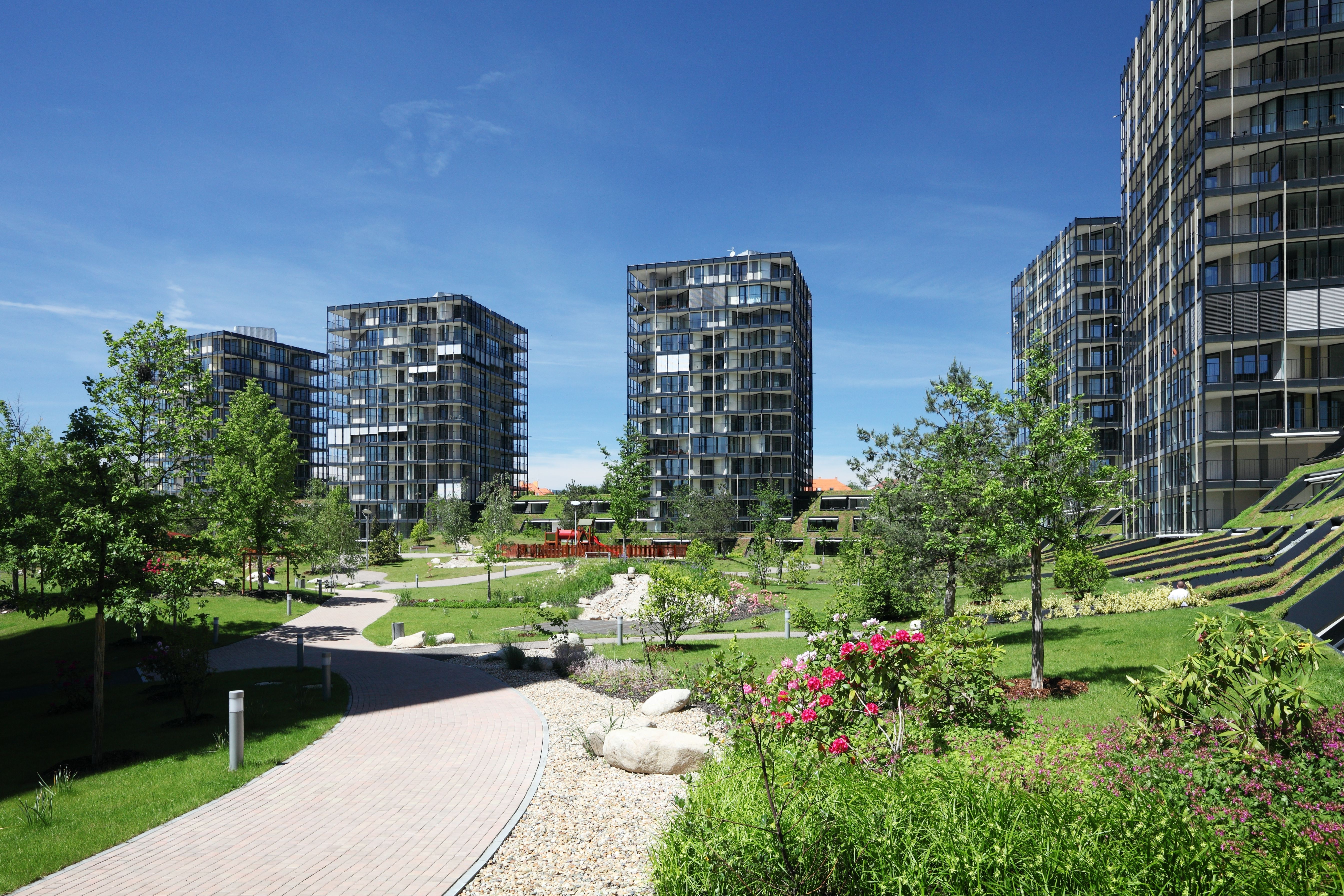 Pohled na projekt a park